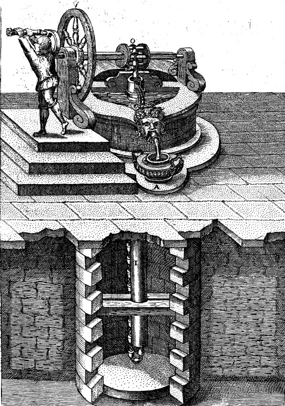 1588年出版的《阿戈斯蒂诺·拉梅利上尉的各种精巧的机械装置》（Le Diverse t Artificiose Machine delCapitano Agostino Ramelli）中关于链泵的插图。